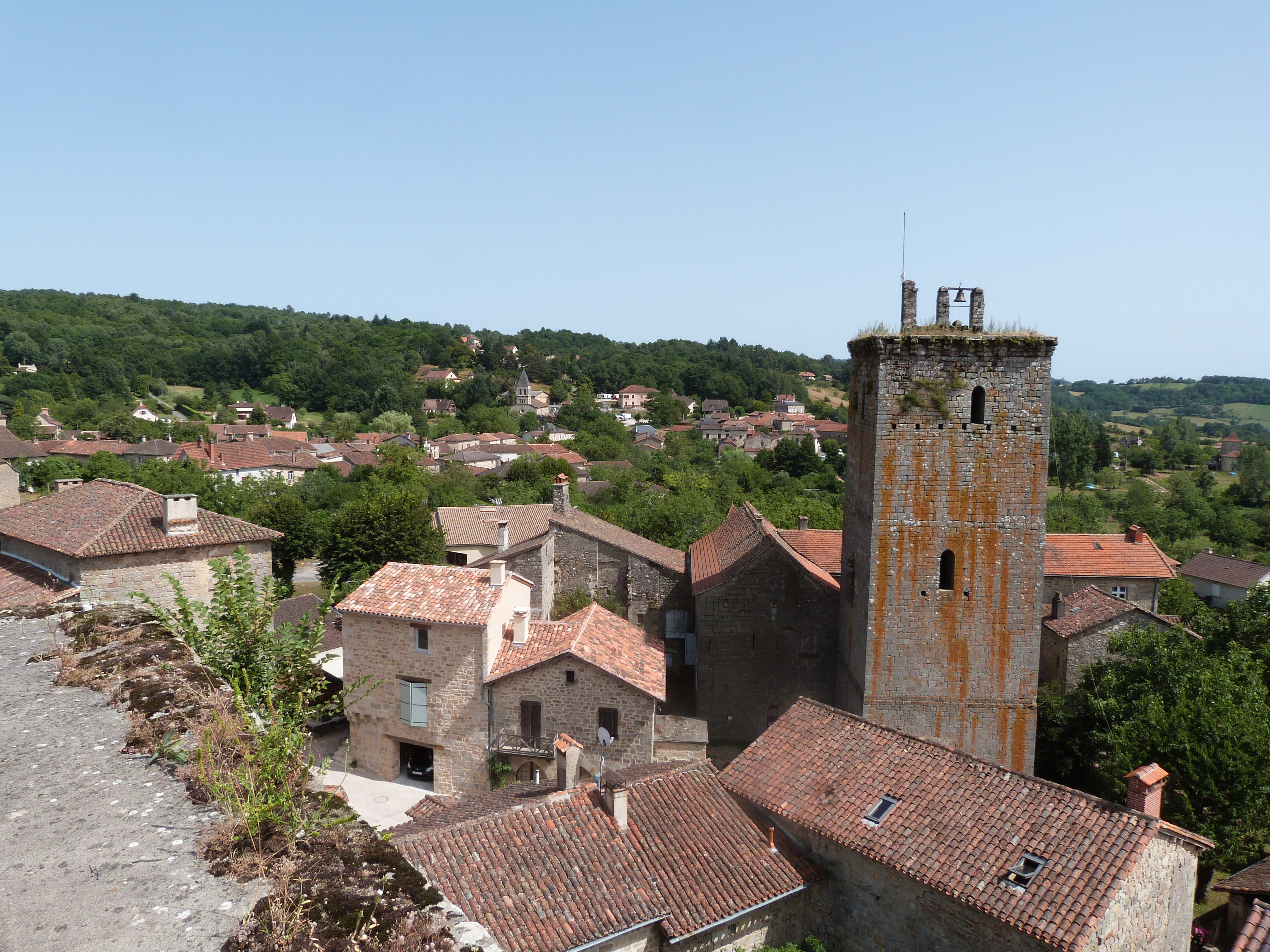 Tour de Sagnes (Inscrit) .